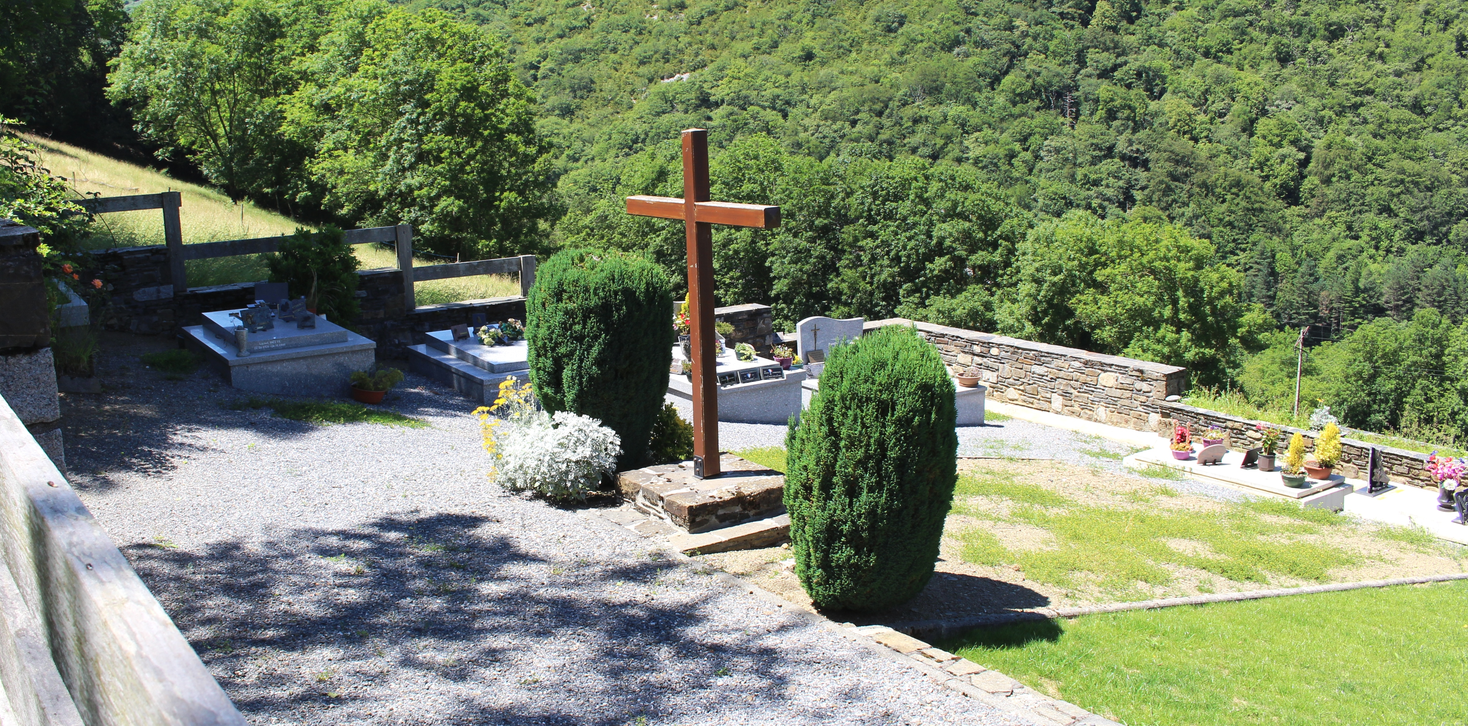 Cimetière de Fréchet-Aure (Hautes-Pyrénées)